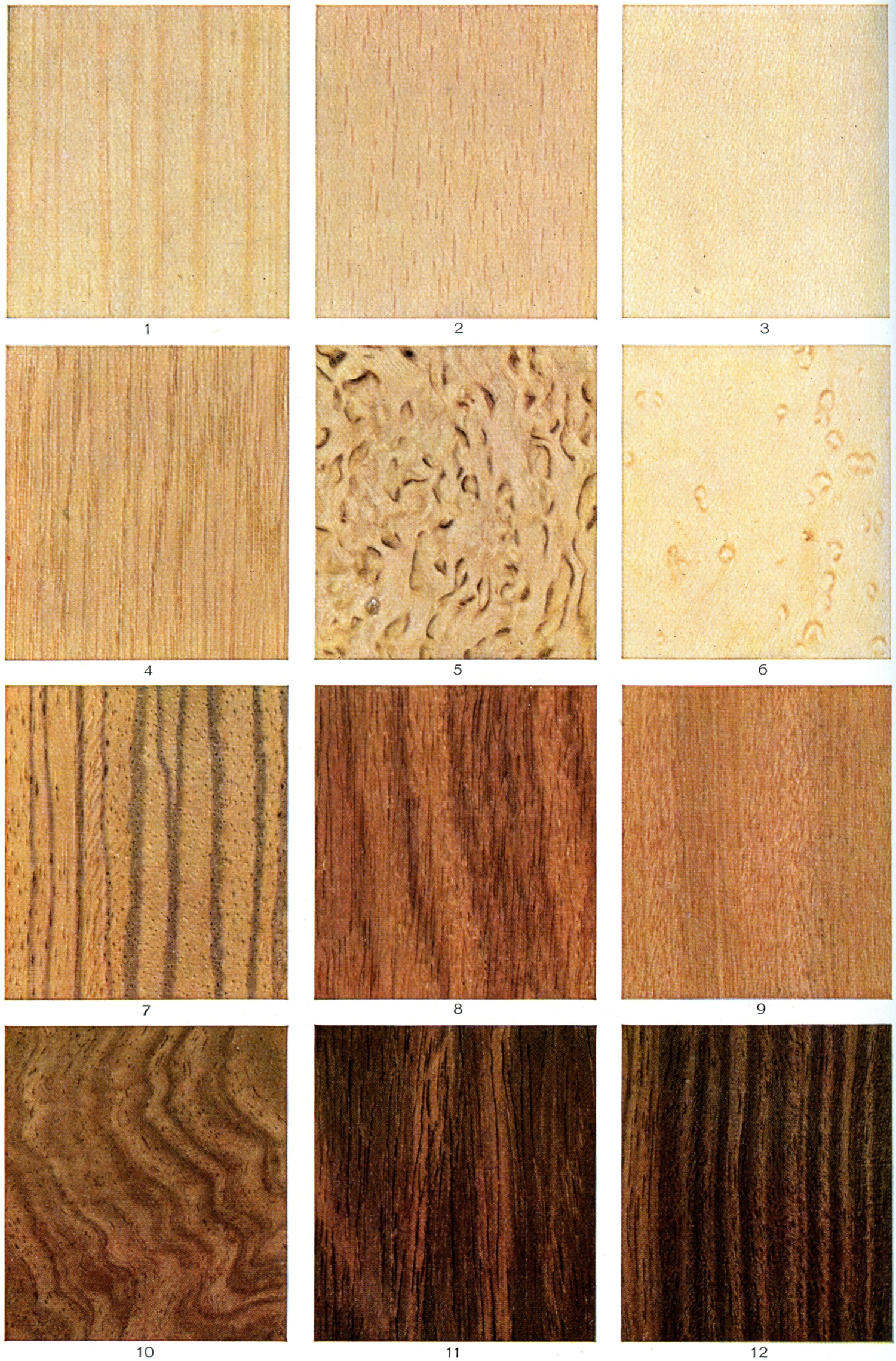 Deutsch – Polski – English – Latino 1. Kiefer – sosna – Pine - Pinus 2. Rotbuche – buk zwyczajny – Common Beech – Fagus sylvatica 3. Ahorn – jawor (klon jawor) – Sycamore – Acer pseudoplatanus 4. Eiche – dąb – Oak – Quercus 5. Schwedische Birke – brzoza – Birch – Betula 6. Vogelaugenahorn – klon cukrowy – Sugar Maple – Acer saccharinum 7. Zebrano – zebrano (zingana) – Microberlinia – Microberlinia 8. Afrikanischer Rosenholz – bubinga – African Rodewood – Guibourtia tessemanni 9. Gabun-Mahagoni (Okoumé) – okume – Angouma, Gaboon, Okoumé – Aucoumea klaineana 10. Französische Walnussbaum (Echte Walnuss) – orzech francuski (orzech włoski) – Common Walnut – Juglans regia 11. Rio-Palisander – palisander brazylijski – Brazilian Rosewood, Rio Rosewood – Dalbergia nigra 12. Makassar-Ebenholz – heban Makassar – Makassar Ebony – Diospyros celebica